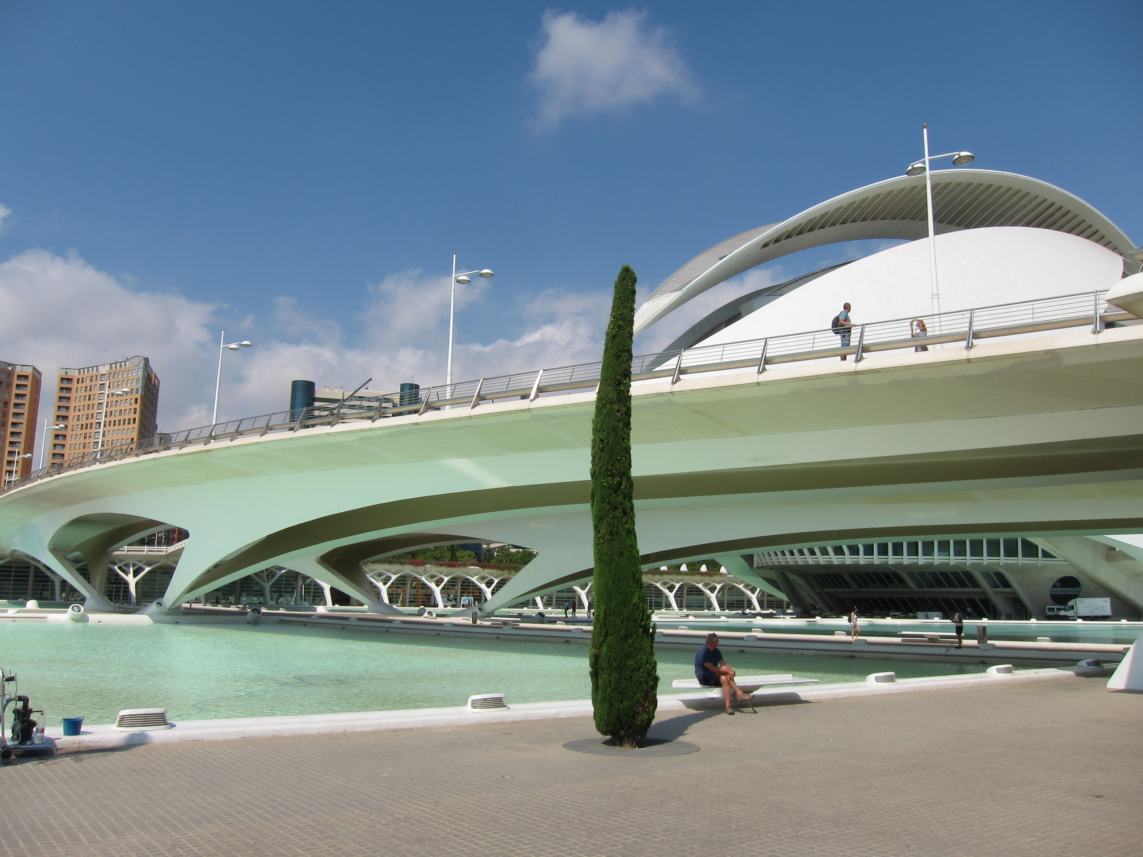 palacio de las artes reina sofía